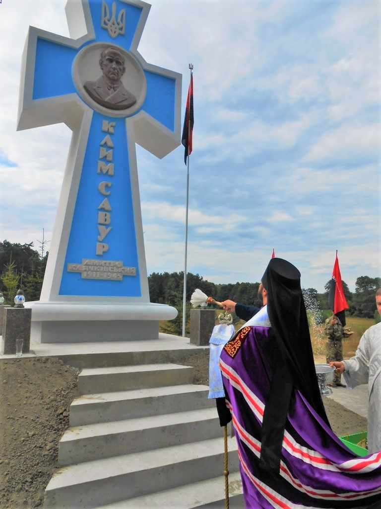 Встановлений 23.08.2015 року на місці смерті Клима Сувура в урочищі Лісничівка, поблизу селища Оржів на Рівненщині.